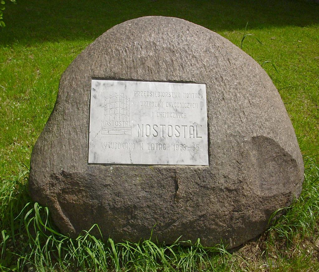 Kamień pamiątkowy przy dawnej siedzibie Mostostalu (Wrocław, ul. Klimasa).